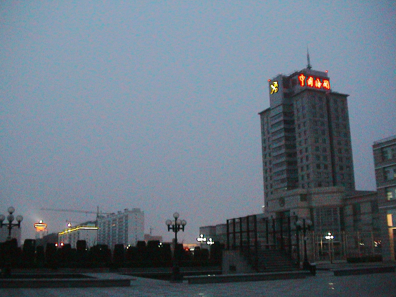 TEDA